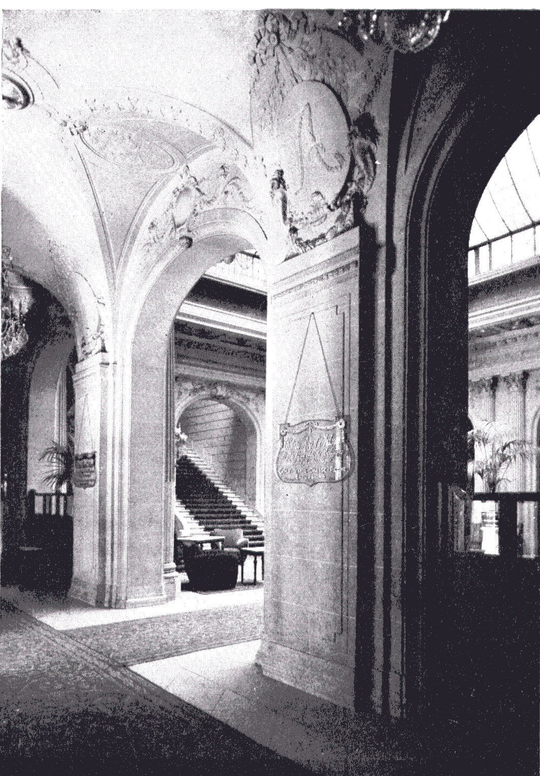 Cliché représentant l'intérieur de l'Hôtel Astoria à Bruxelles, oeuvre de l'architecte Henri VAN DIEVOET (1869-1931)